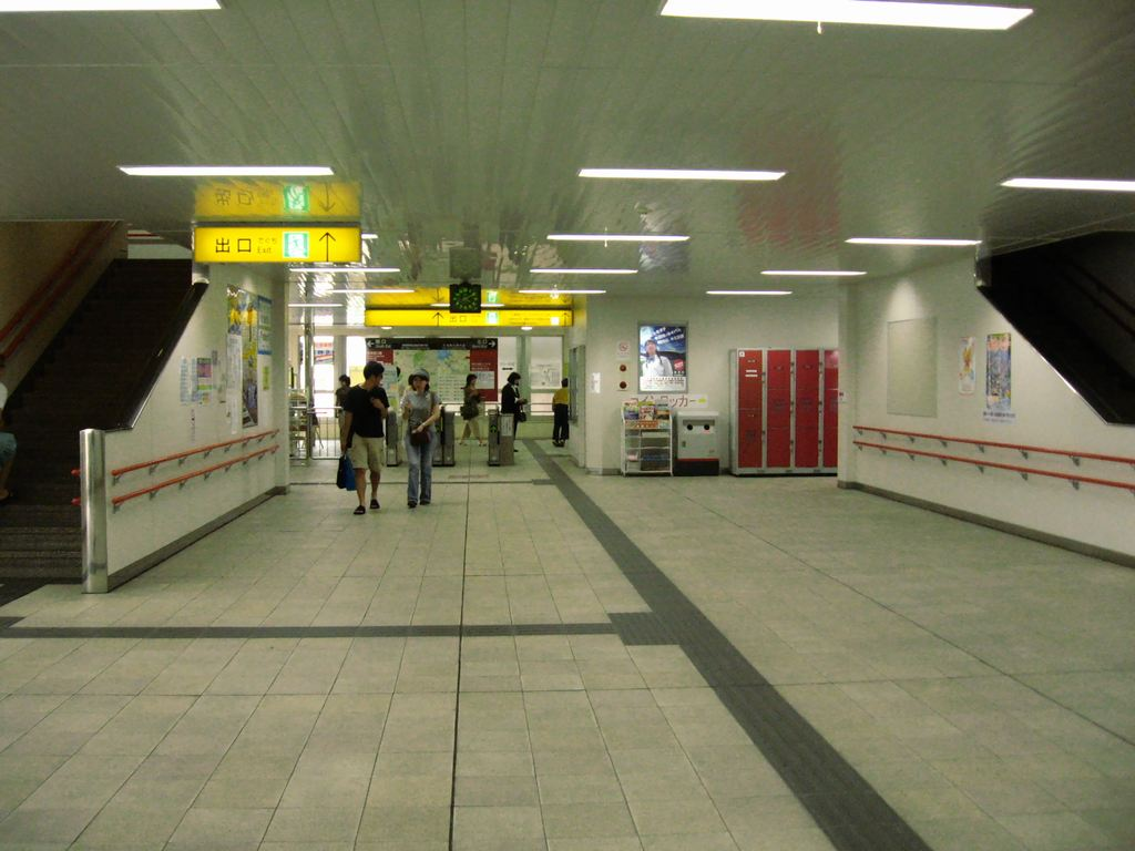 沖縄都市モノレール線首里駅構内